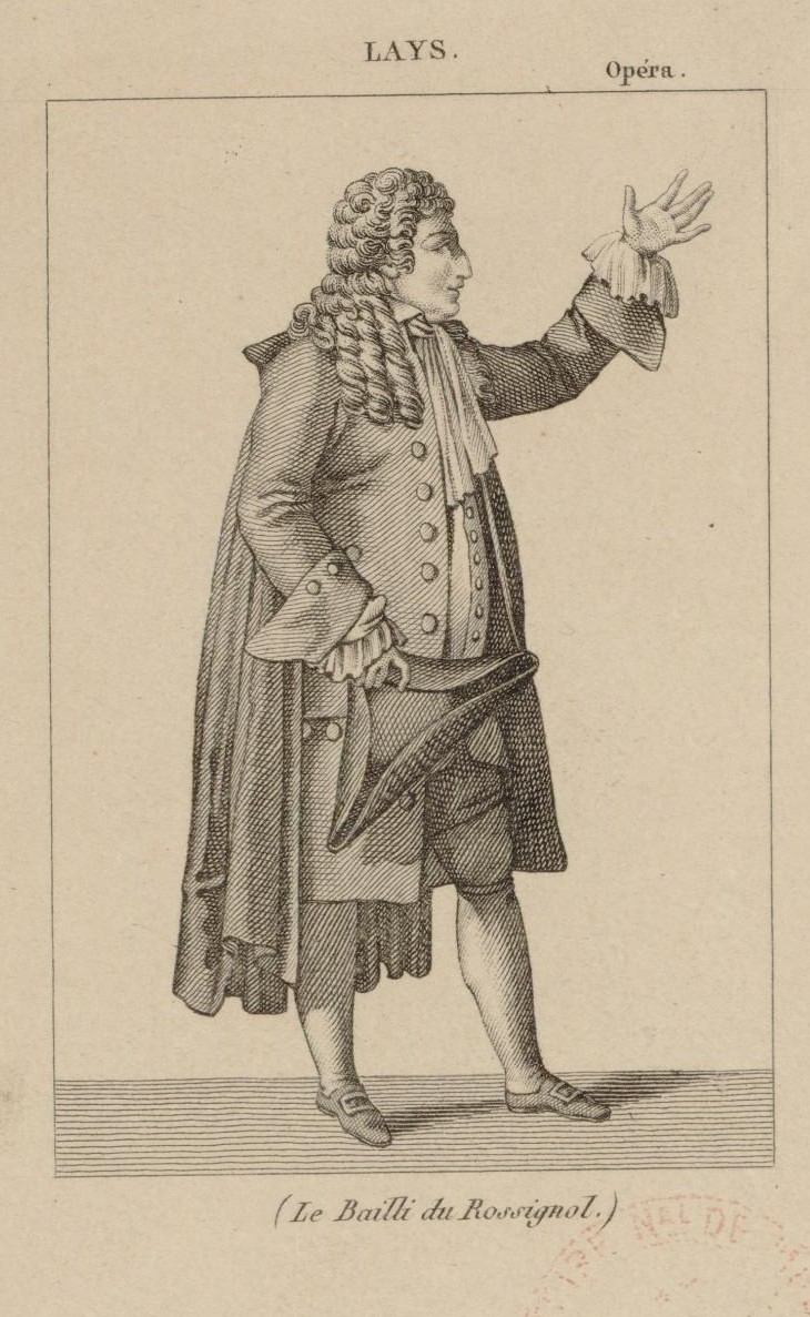 François Lays (1758-1831) all'Opéra de Paris nel Bailli du Rossignol (1800)